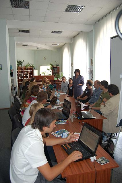 Захід у Харківській ОУНБ